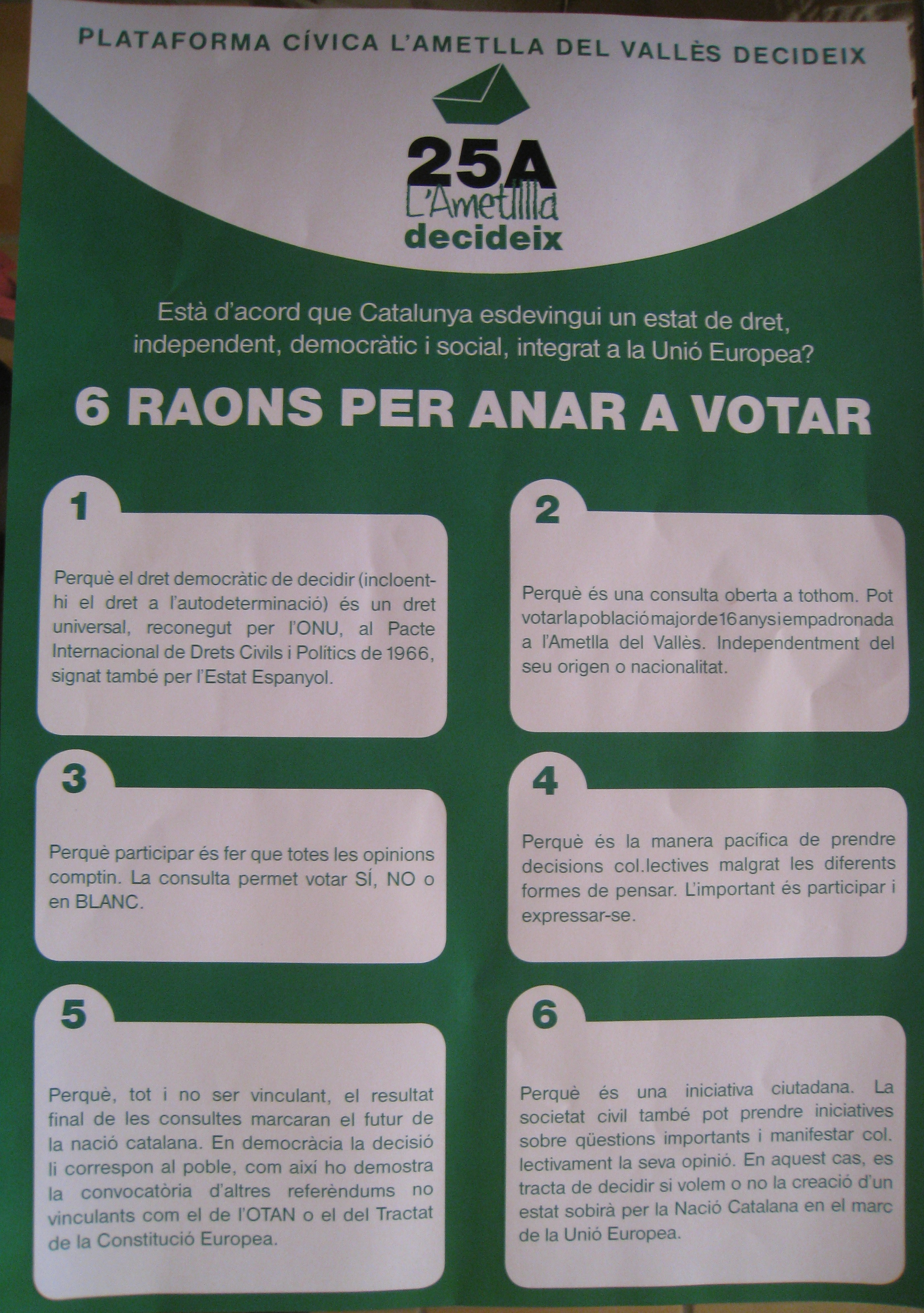 fullet promocional a la participació al referendum per la independència de Catalunya del 25 d'abril de 2010 a l'Ametlla del Vallès.